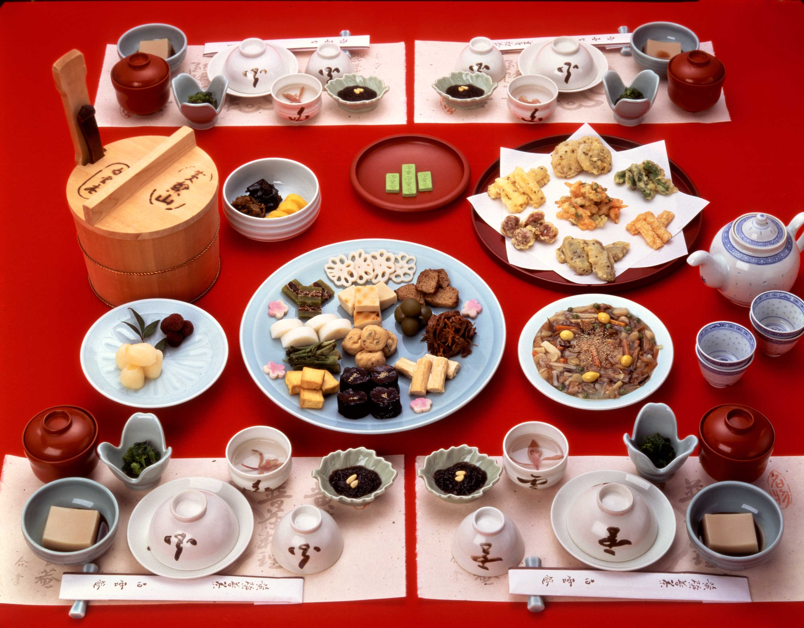 普茶料理の写真